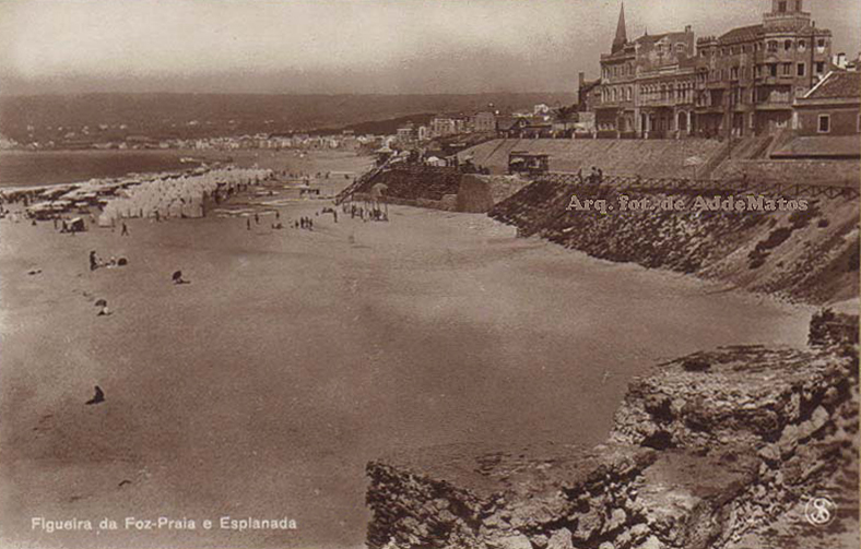 Praia e esplanada da Figueira da Foz, em 1880. É visível um “carro americano” (bonde de tracção animal).